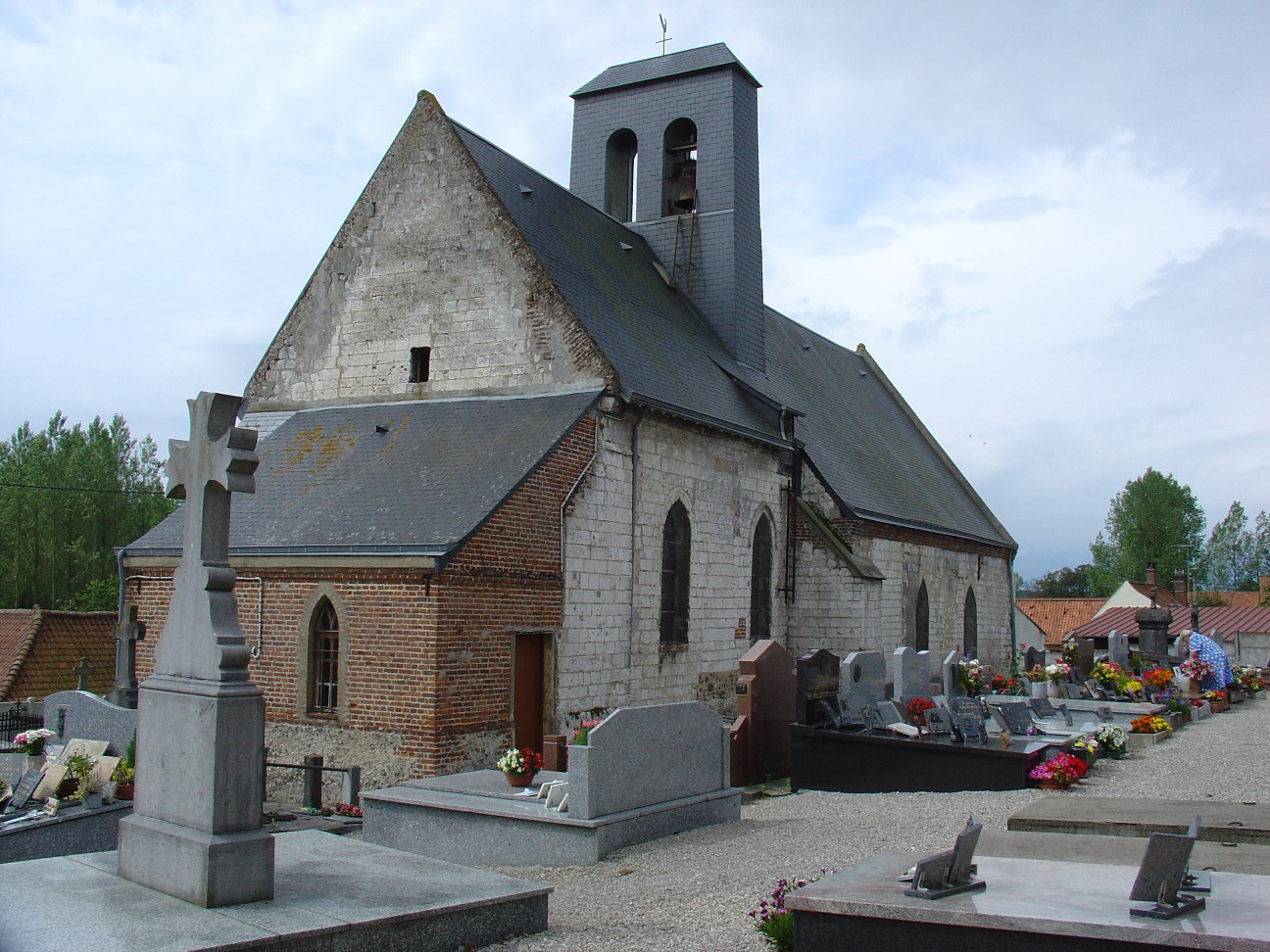 Église de Loison-sur-Créquoise